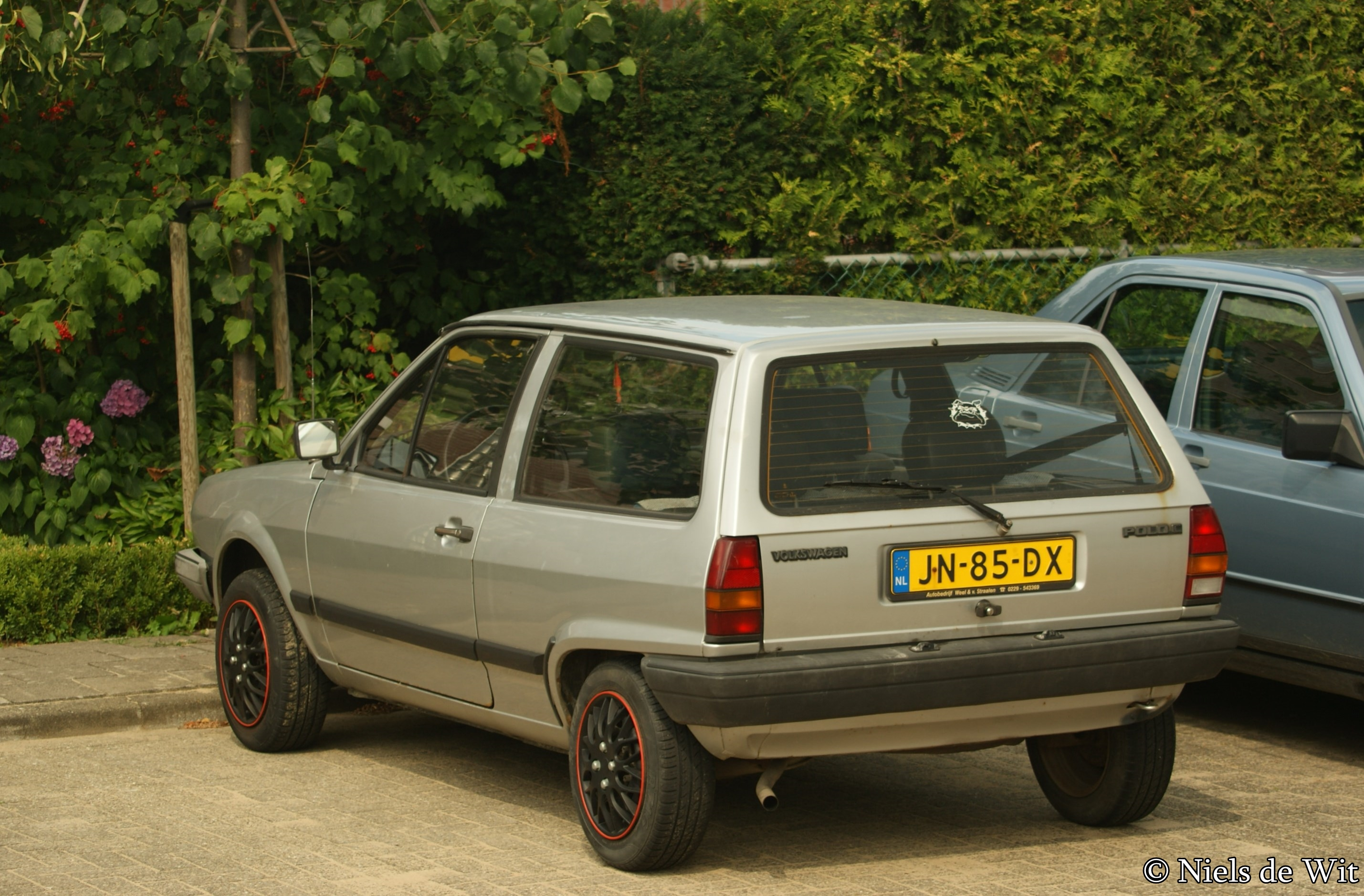 JN-85-DX